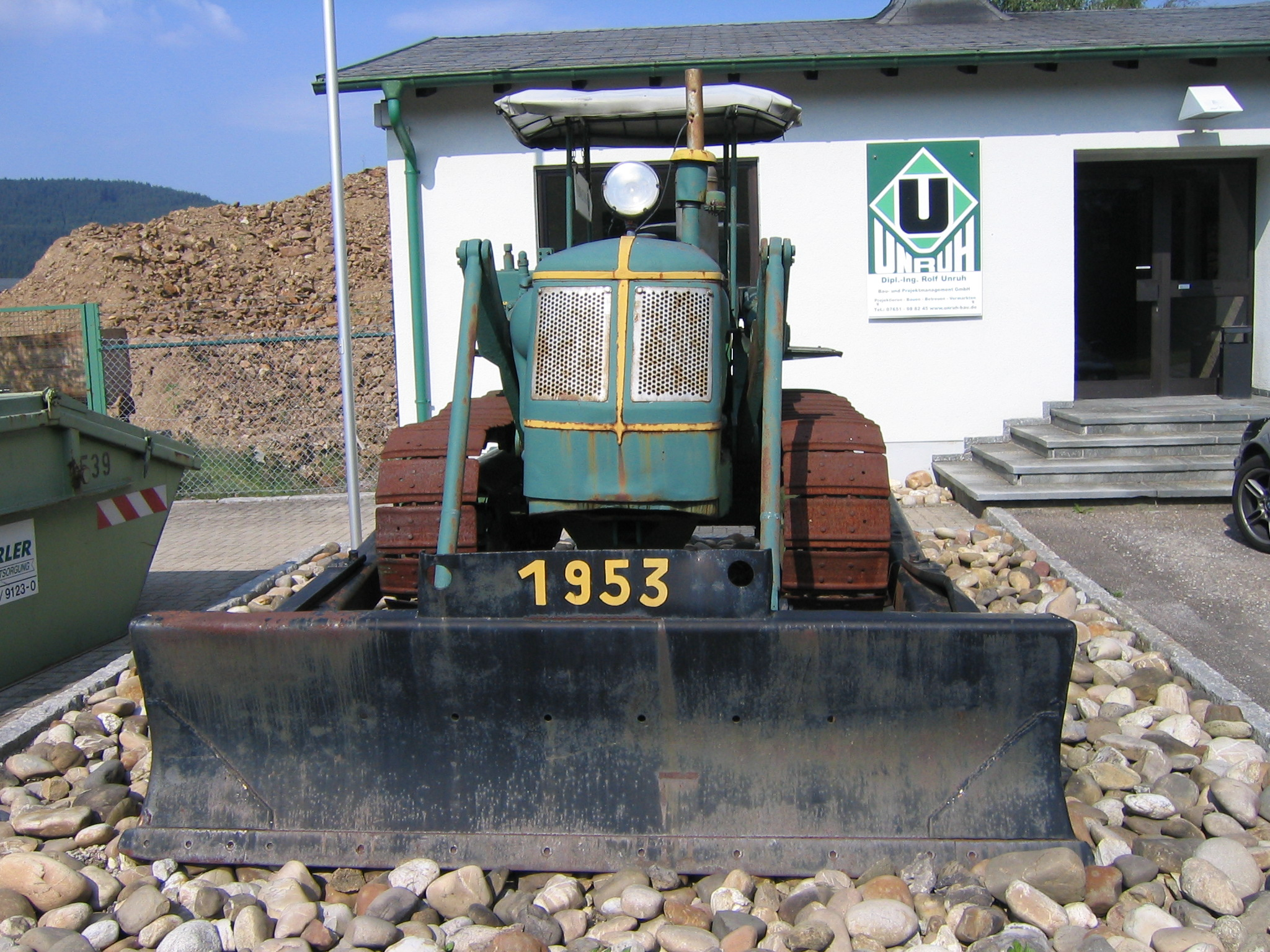 German bulldozer, recorded in Titisee-Neustadt